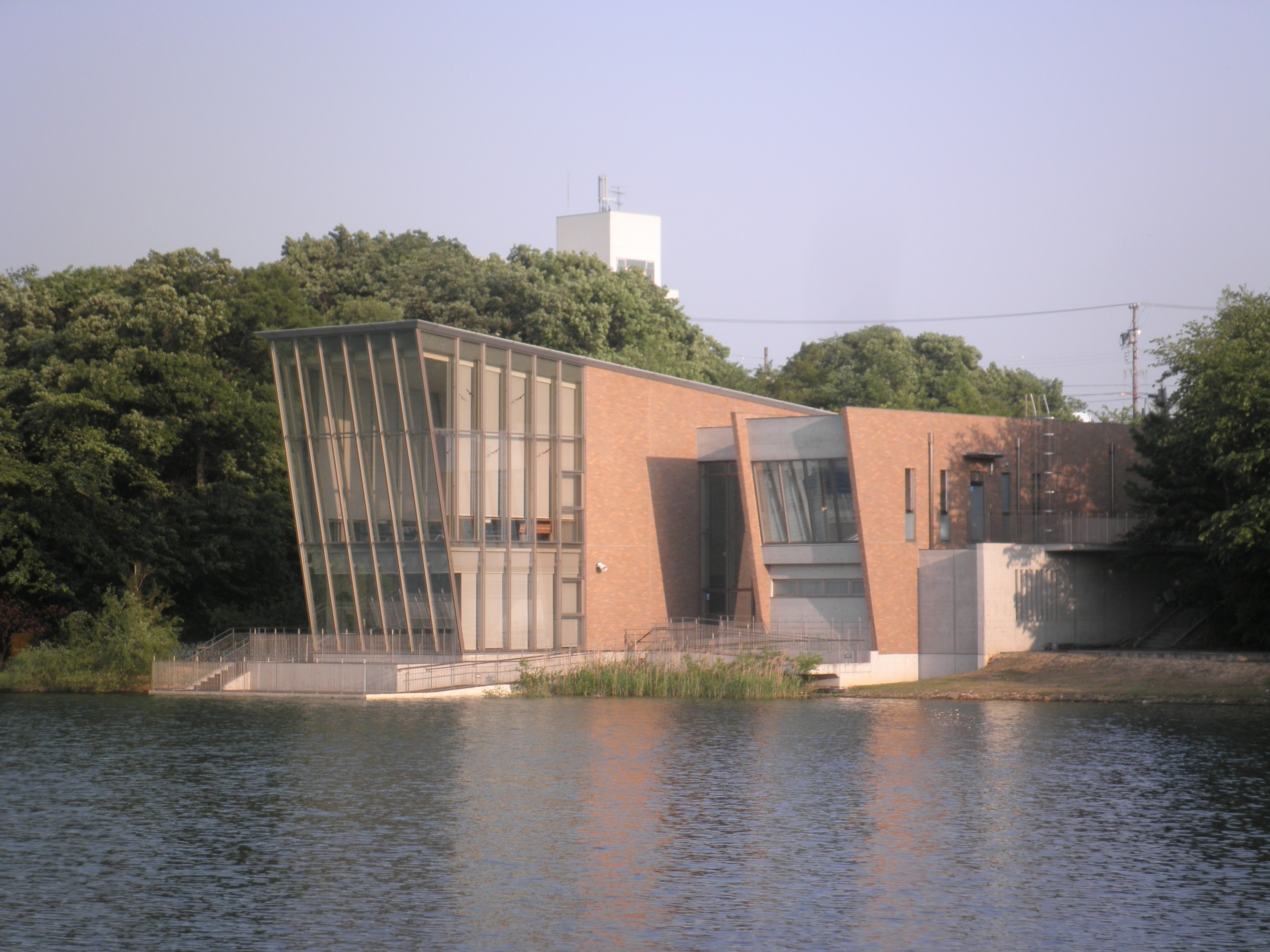 愛知県大府市横根町にある二ツ池公園 自然体験学習施設「セレトナ」